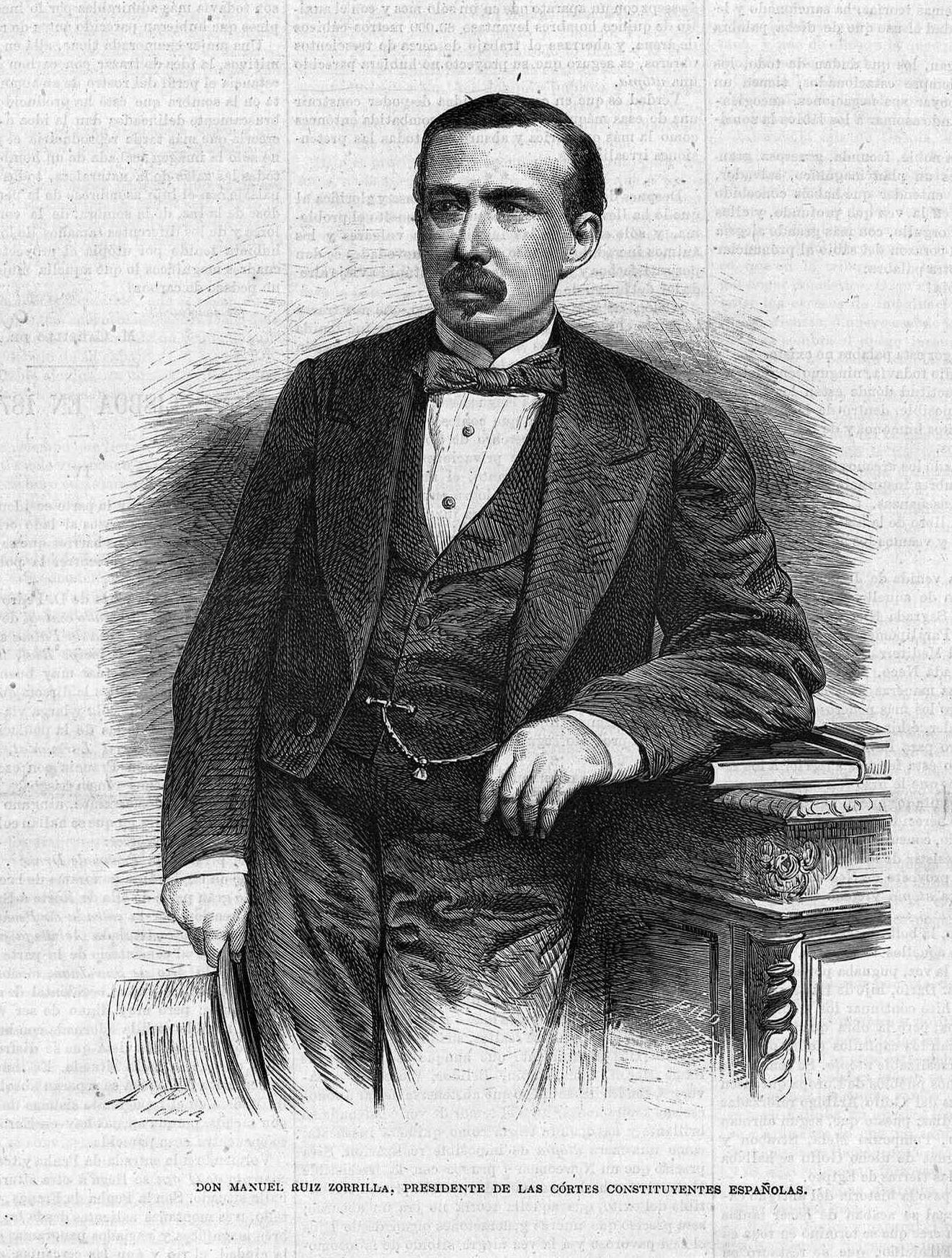 «Don Manuel Ruiz Zorrilla, presidente de las Cortes constituyentes españolas», en la revista La Ilustración de Madrid.